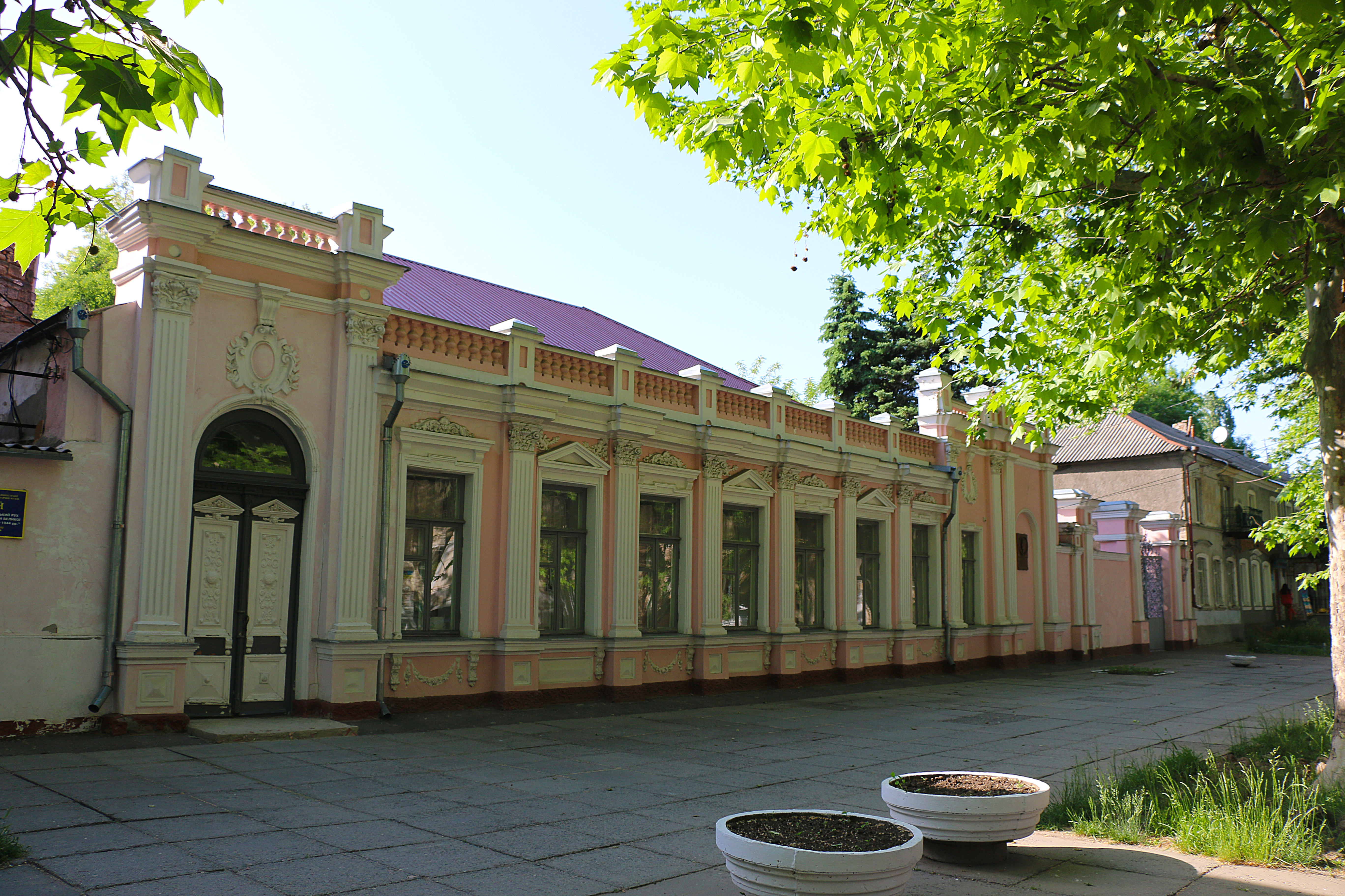 Житловий будинок-особняк, в якому в роки Великої Вітчизняної війни у 1941 – 1943 рр. мешкав розвідник, Герой Радянського Союзу В. О. Лягін, Миколаїв, вул. Лягіна, 5